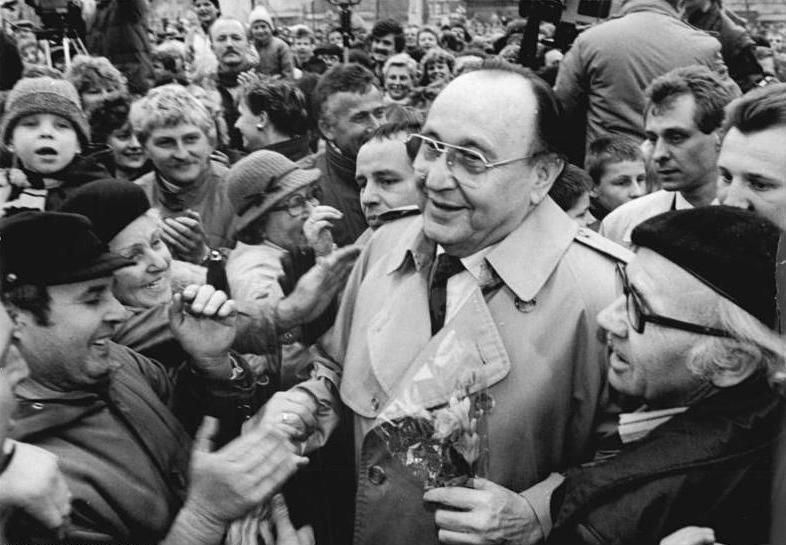 ADN-ZB Hirndorf 28.2.90 Erfurt: An einer Wahlkundgebung der F.D.P. der DDR auf dem Domplatz der Bezirksstadt nahm Bundesaußenminister Hans-Dietrich Genscher (FDP) teil. Erstmals trat der Minister zum politischen Aschermittwoch nicht in der BRD auf.